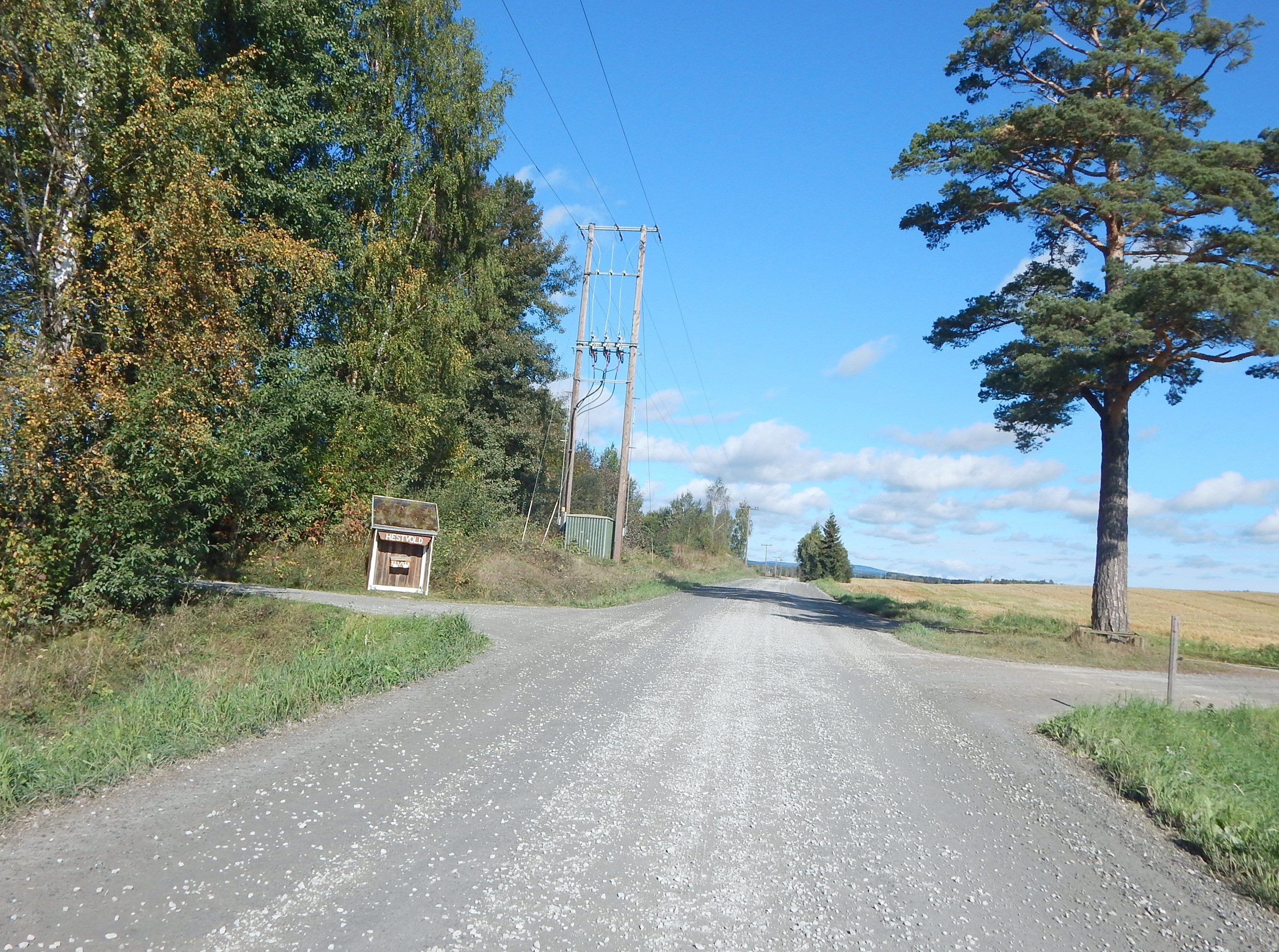 Balkevegen (fylkesvei 1824, tidl. 151) i Løten